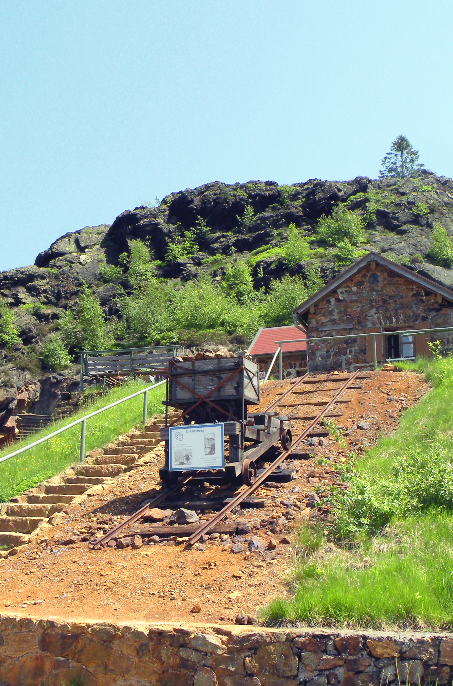 Бремсберг. Рудник на Зильберберг.Богемский лес.